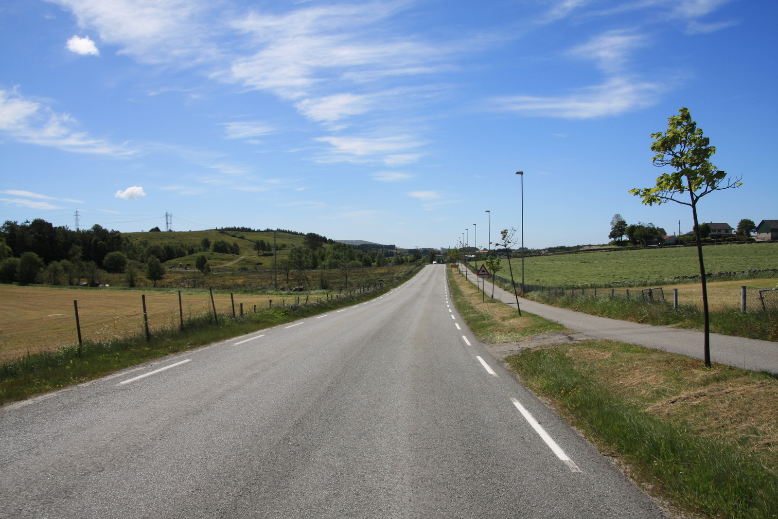 Fylkesvei 505 Kvernelandsveien